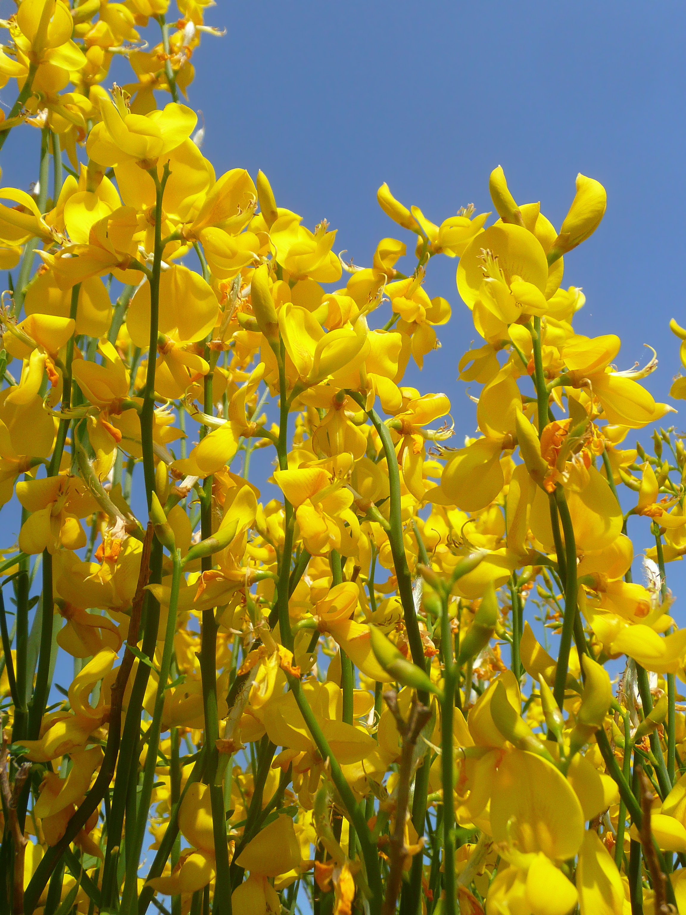 Эмоции цвета и света ))) Метельник ситниковый (Spartium junceum) Окрестности Суджукской лагуны, Новороссийск 31 мая 2010 г.